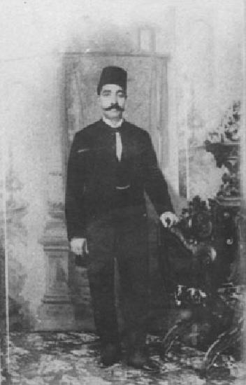 المطرب المصري عبده الحامولي الذي ذاع صيته في عهد الخديو إسماعيل